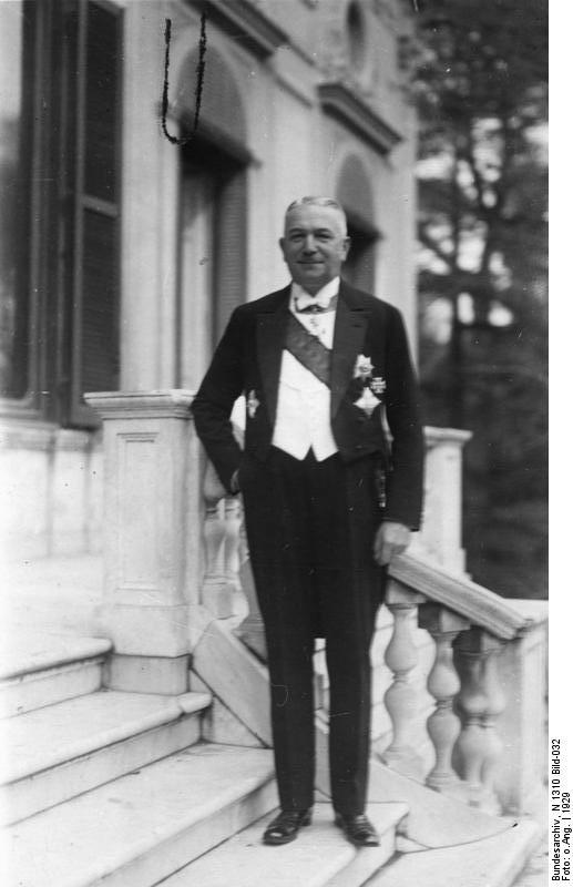 Rom, Konstantin von Neurath Auf der Botschaftstreppe [?] in Rom [Italien, Rom.- Porträt Konstantin Freiherr von Neurath vor der Hochzeit von Umberto II. von Savoyen mit Marie von Belgien auf der Treppe der deutschen Botschaft] Abgebildete Personen: Neurath, Konstantin von Freiherr: Außenminister, Reichsprotektor für Böhmen und Mähren, Deutschland (PND 118786016)